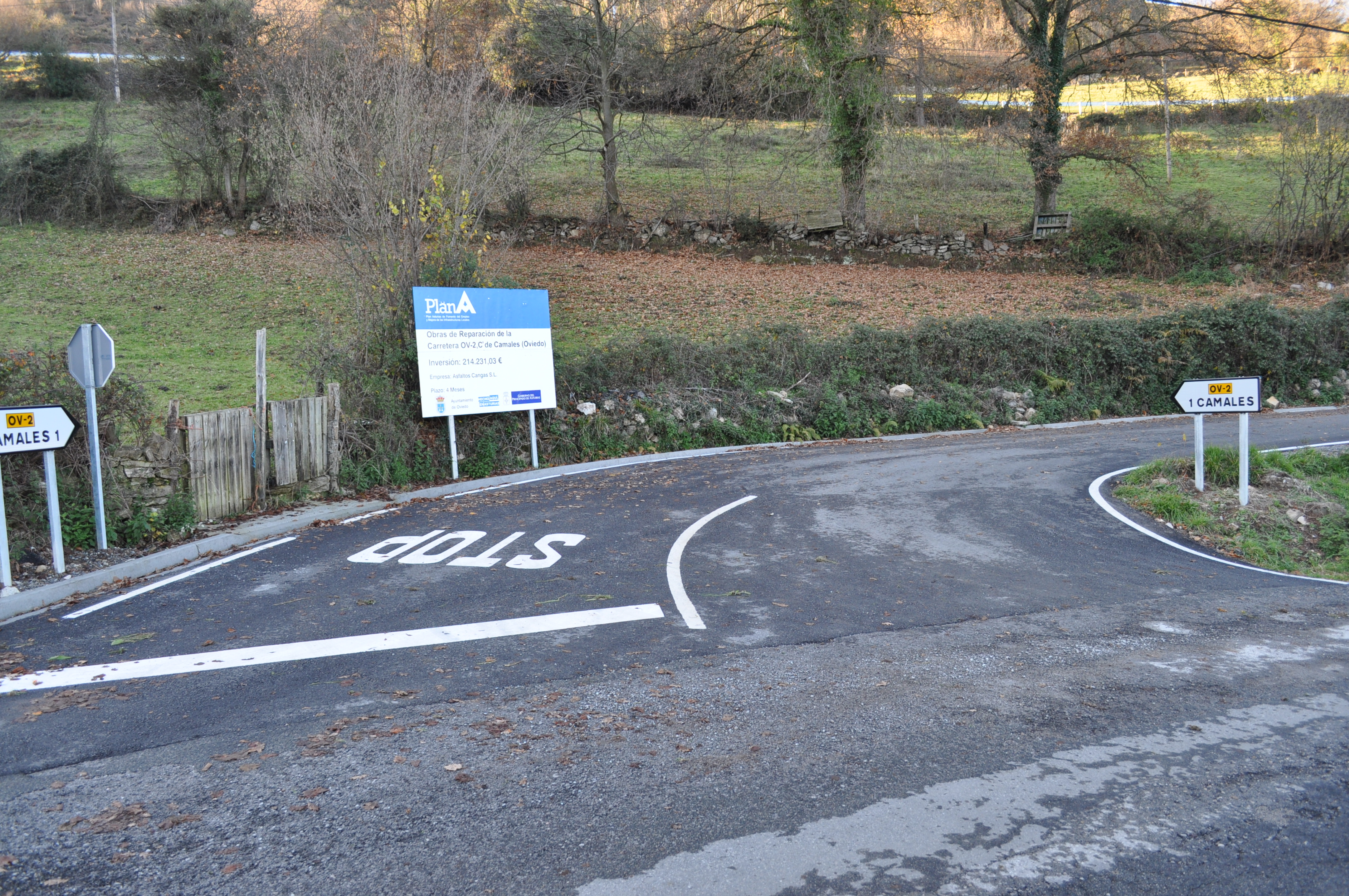 AS-313 a la altura del desvío a Camales por la OV-2.